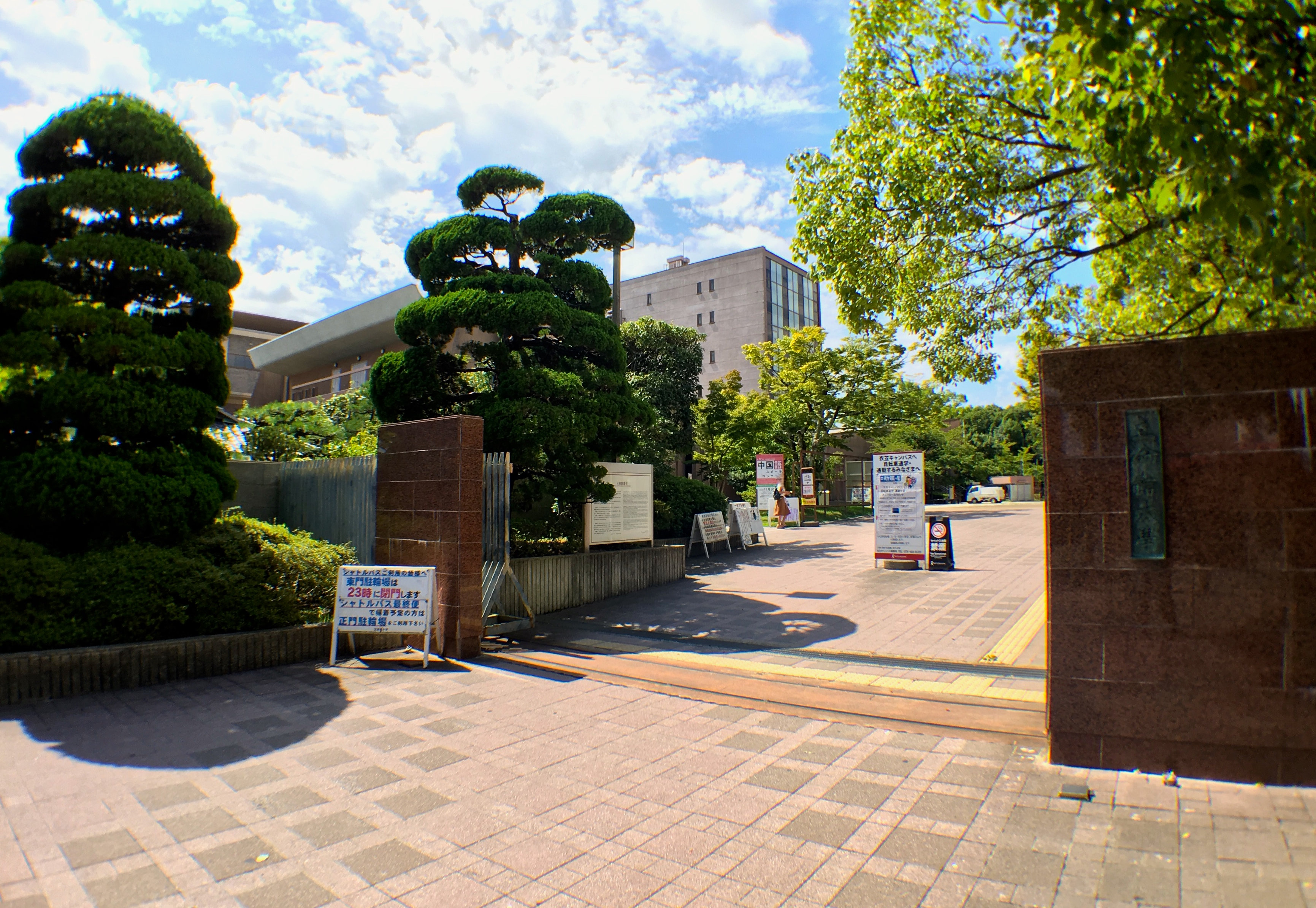 The photo was taken by me on September 10, 2016.